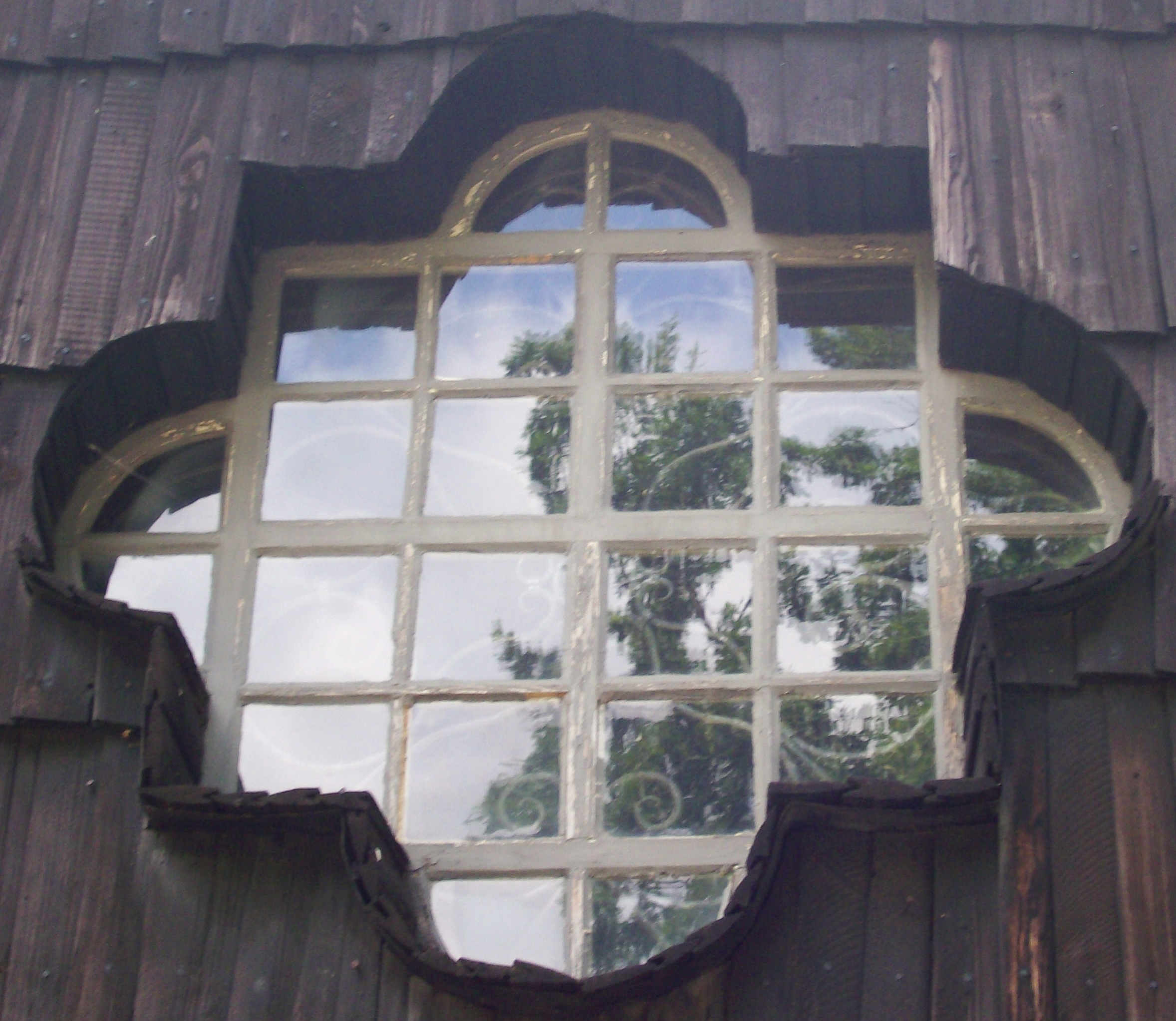 Kościół św. Anny w Oleśnie - okno w kształcie czworoliścia